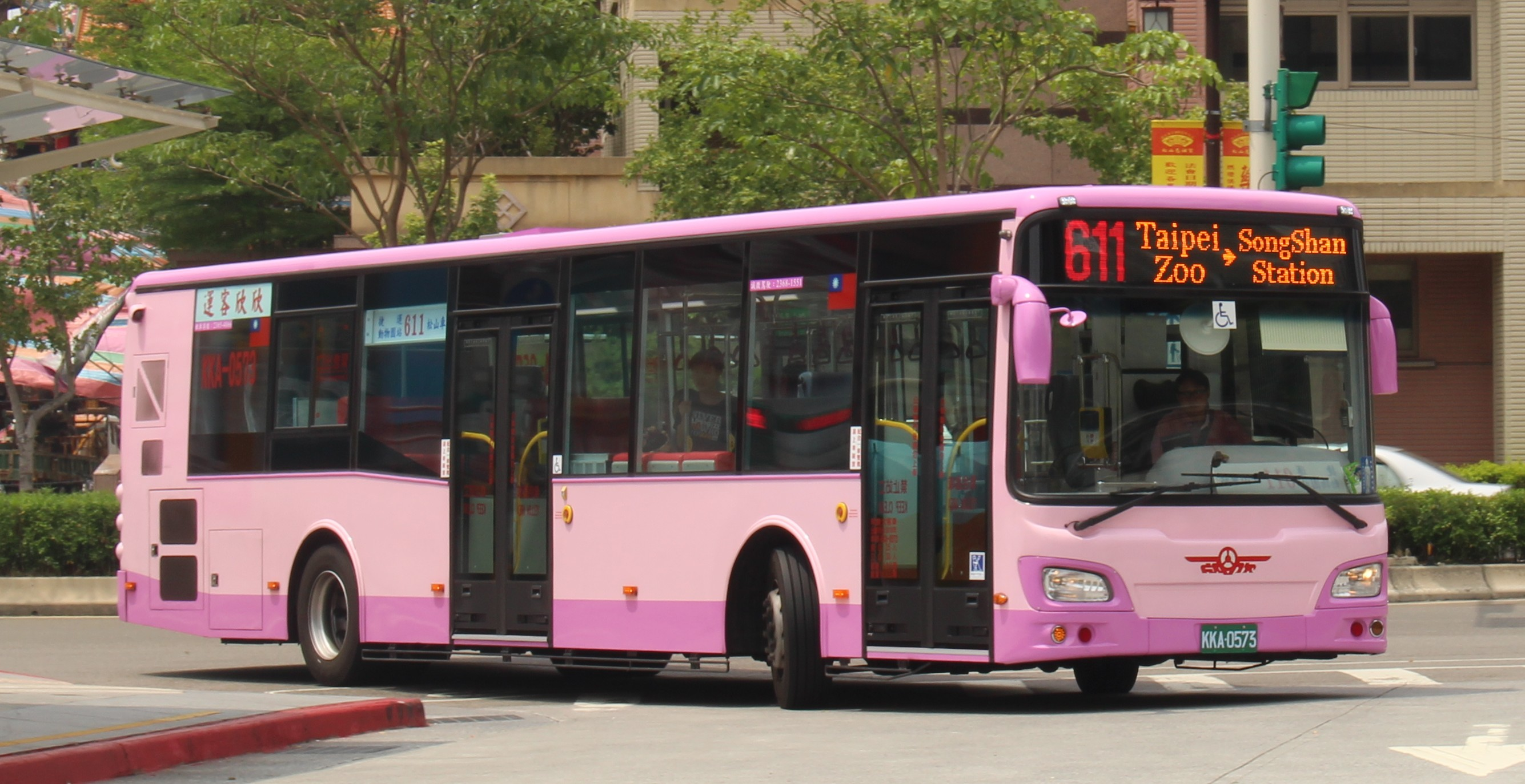 欣欣客運馨盛車體國瑞日野低地板